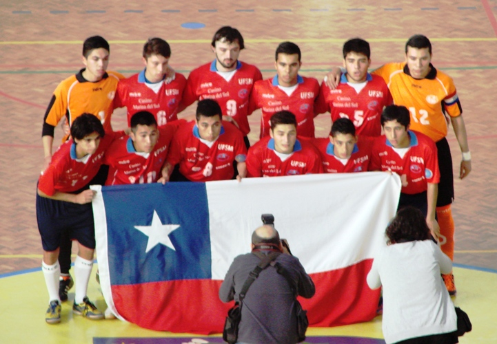 Foto da Seleção Chilena de Futebol de Salão no Mundial C-20 de 2014